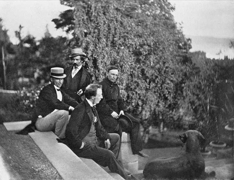 Johan Sebastian Welhaven, Thomas Heftye, Ole Fladager og Hartvig Marcus Lassen på trappen foran Villa Frognæs. trapp, gruppe, menn4, skulptur: hund.